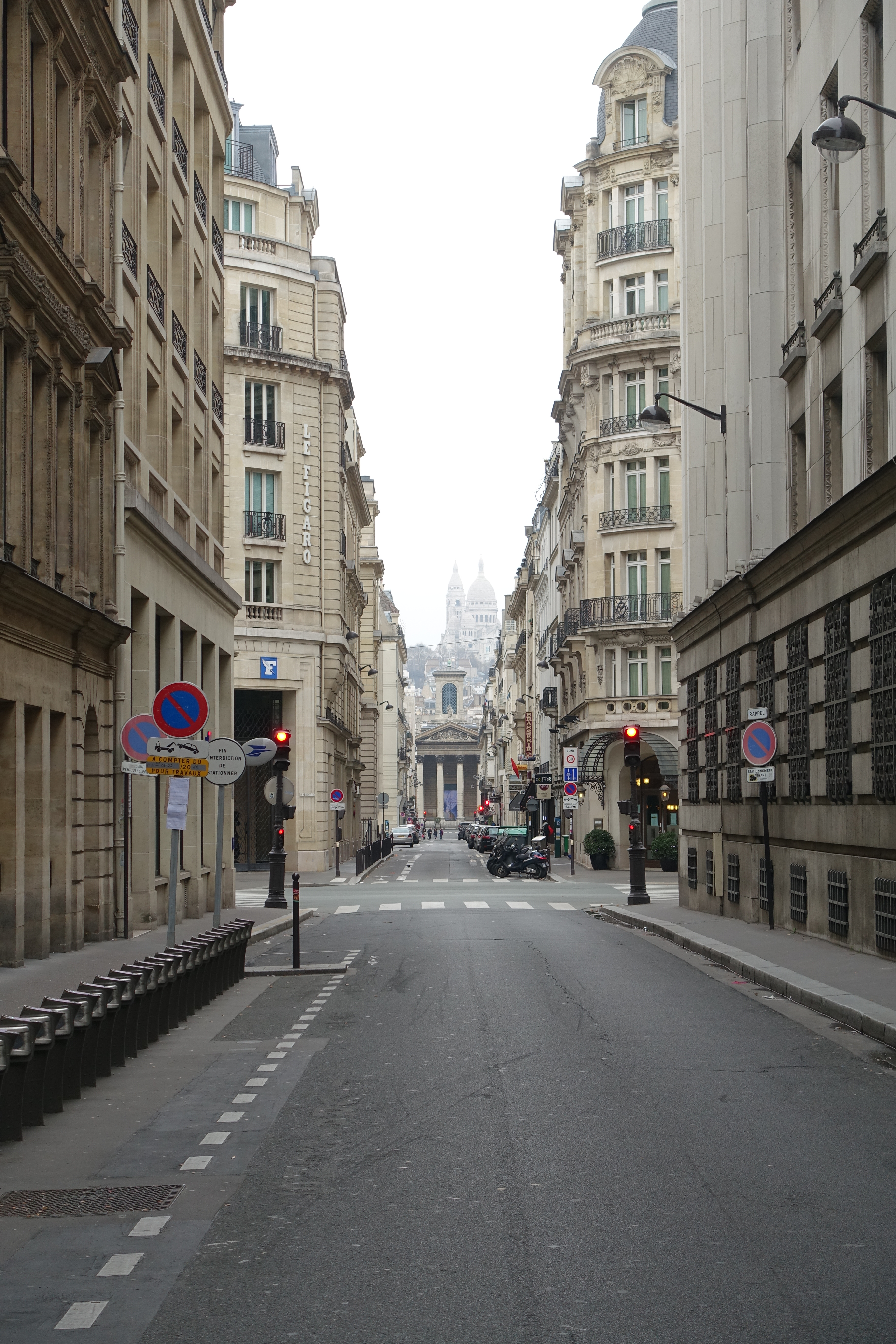 Paris